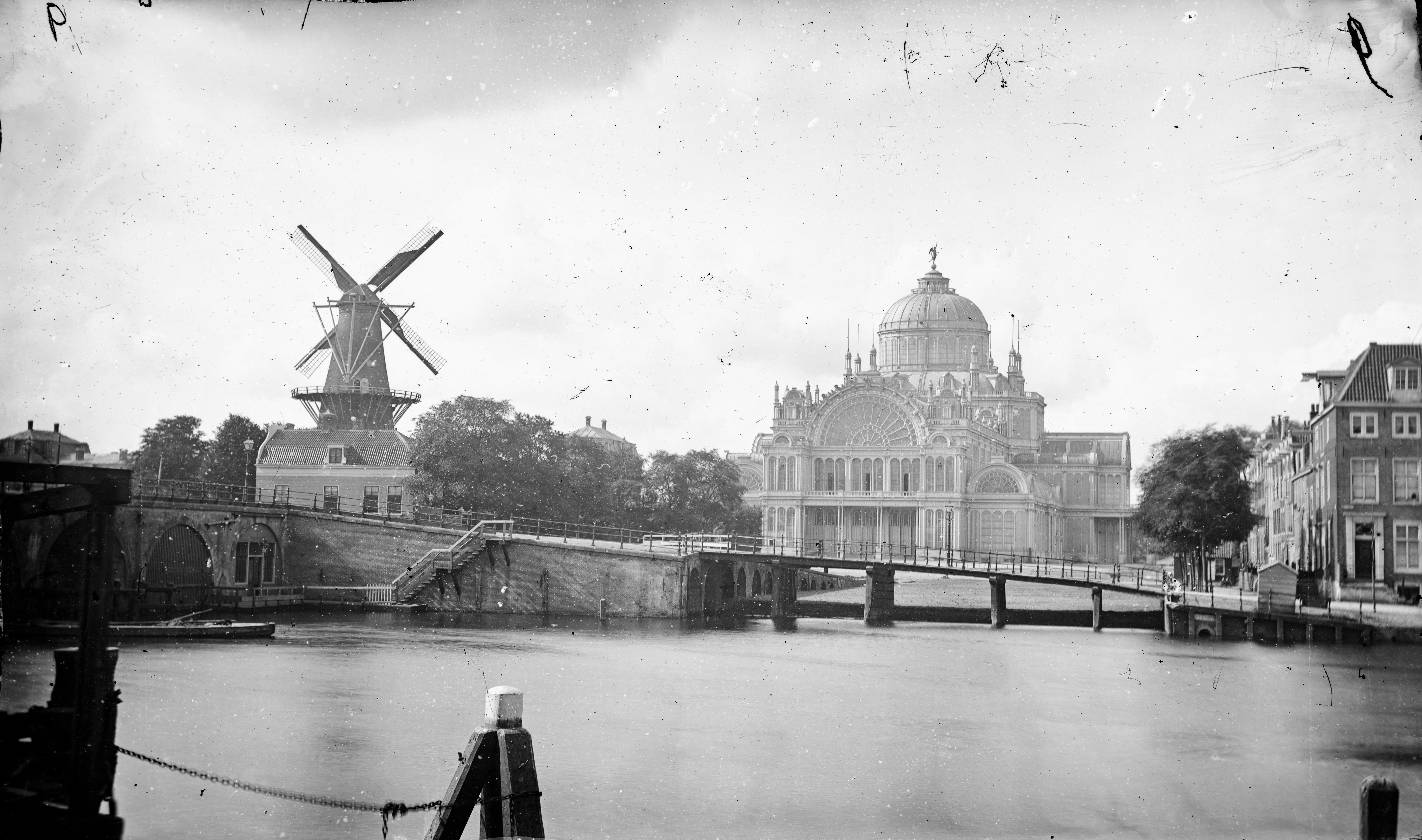 Beschrijving De Binnen Amstel gezien naar het in 1866 gedempte Amstelgrachtje, thans Maarten Jansz Kosterstraat, en het Paleis voor Volksvlijt op het FrederikspleinLinks de Hooge Steenen Molen, afgebroken in 1868. Oorspronkelijke kabinetfoto uitgegeven door A. Jager.Documenttype fotoVervaardiger Jager, A.Collectie Collectie Kunsthandel Gebr. Douwes: glasnegatievenDatering 1867Geografische naam AmstelgrachtjeFrederikspleinAmstelInventarissen B00000031512 Generated with Dememorixer